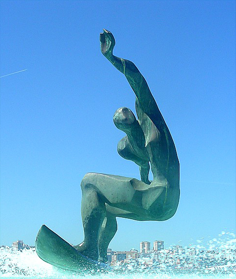 Surf. A Coruña, Galicia (Spain)